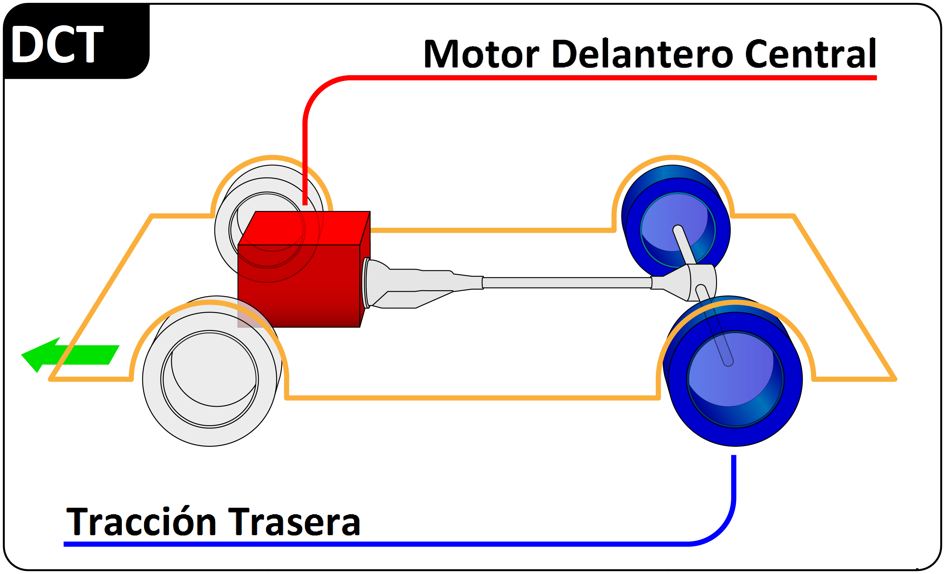 Diagrama de un vehículo con motor delantero central y tracción trasera (DCT)